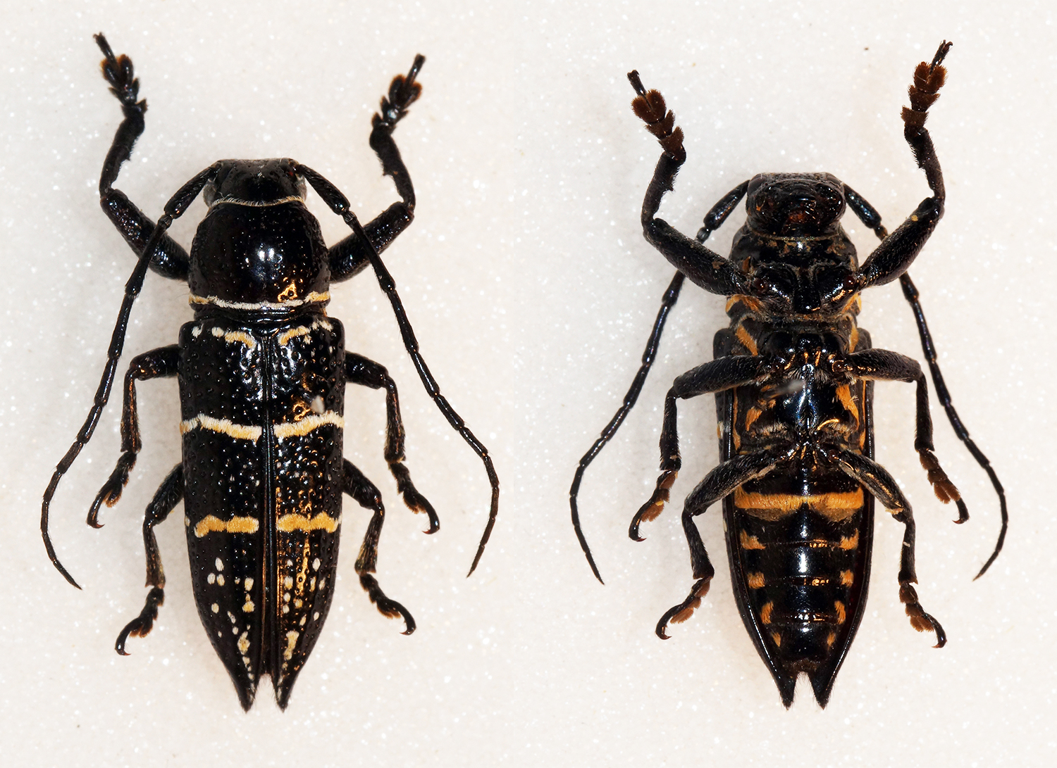 Pascoe,1864 Sex: Male Data: 05-2011 - Labuha - Bacan Island - Indonesia Size: 16mm